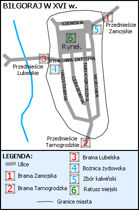 Biłgoraj pod koniec XVI w., wersja poprawiona. Na podst. pracy R.P.